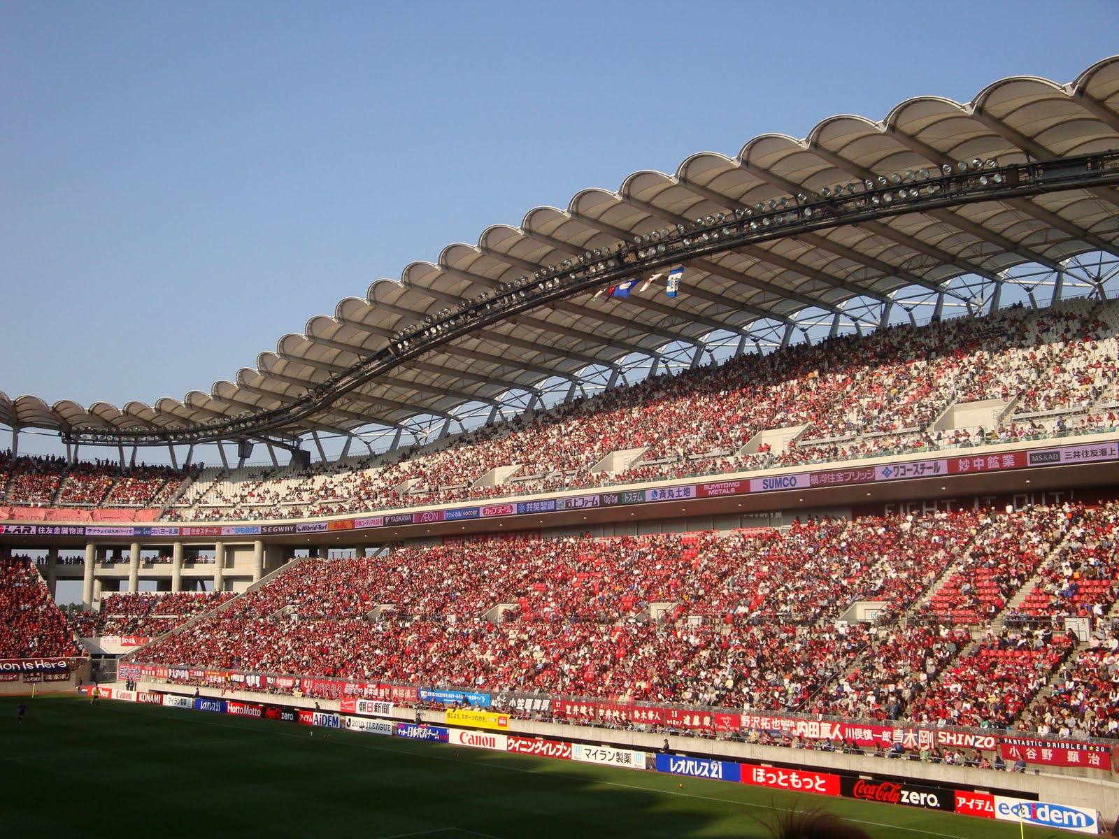 20100501_Kashima Antlers vs Gamba Osaka @Kashima soccer Stadium_003